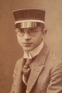 Porträtfotografie von Albrecht Eitner als Corpsburschen der Borussia Breslau